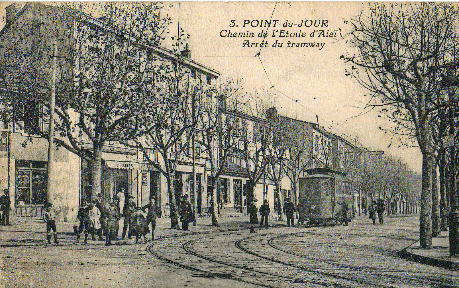 Carte postale ancienne sans mention d'éditeur, n°3 : POINT-DU-JOUR - Chemin de l'Étoile d'Alaï